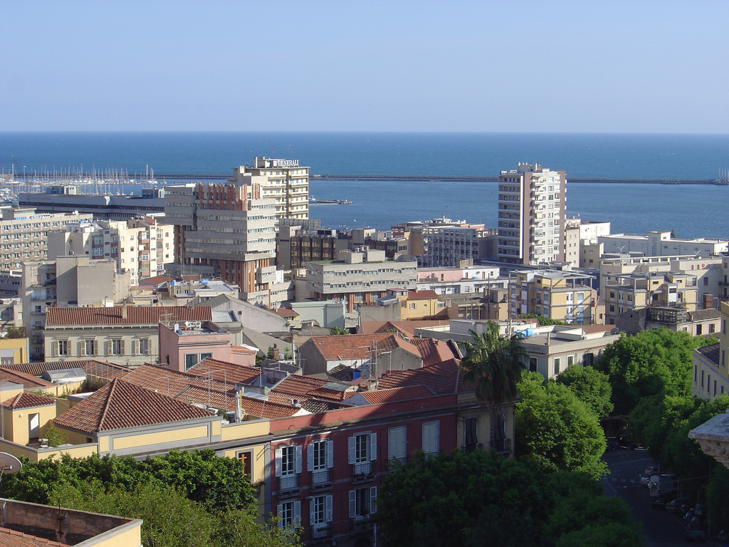 Cagliari